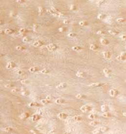 Vogelaugenahorn